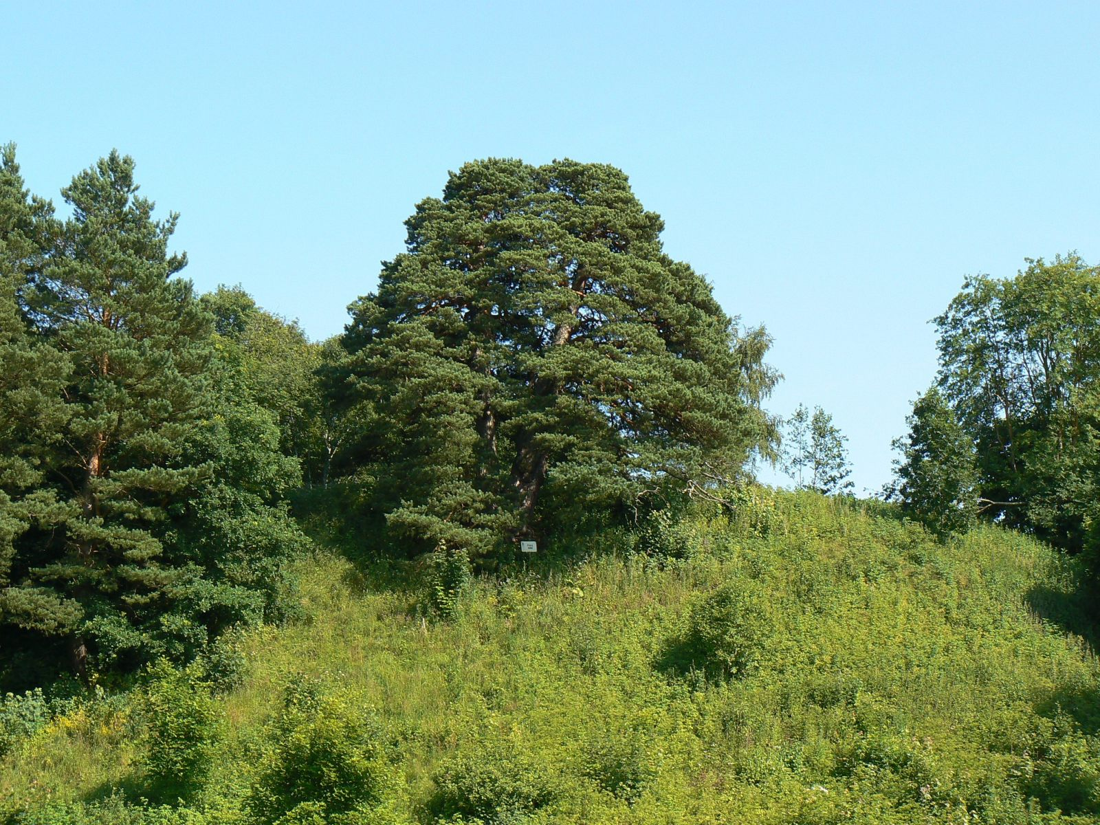 Padaoru mänd